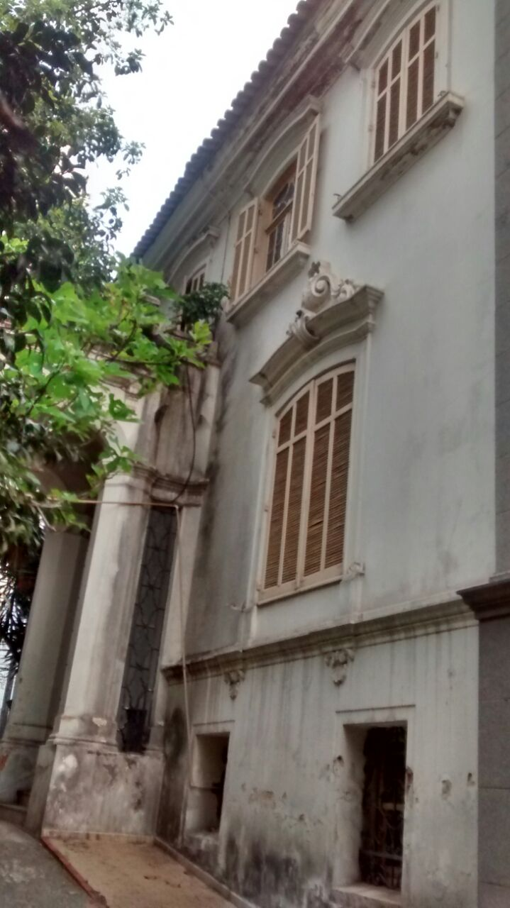 Fachada da casa da rua Cardoso de Almeida